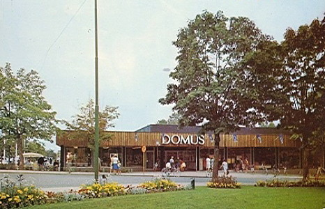 Domus i Hjo